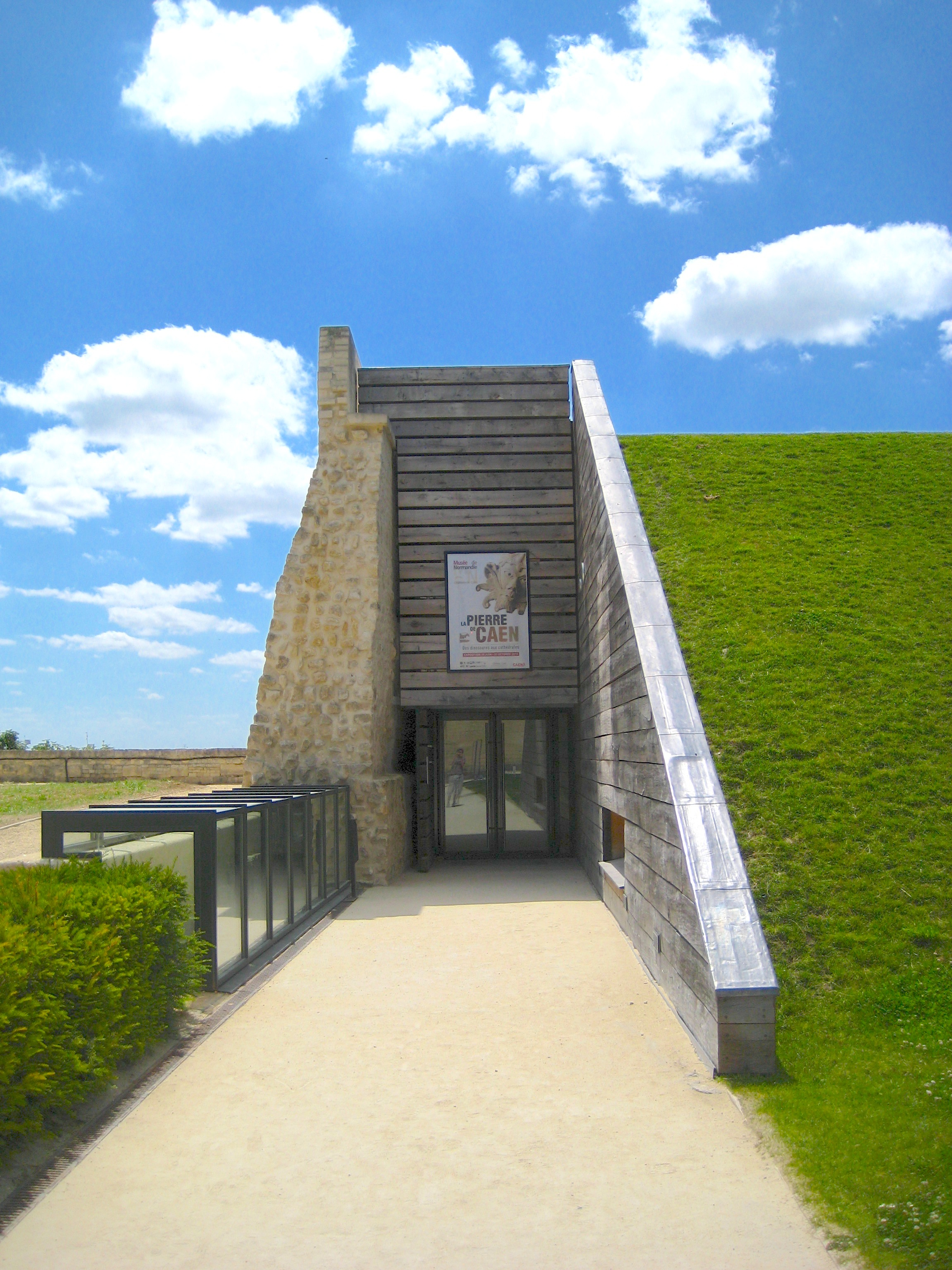 entrée de la salle des Remparts, musée de Normandie à Caen (Calvados, Basse-Normandie).